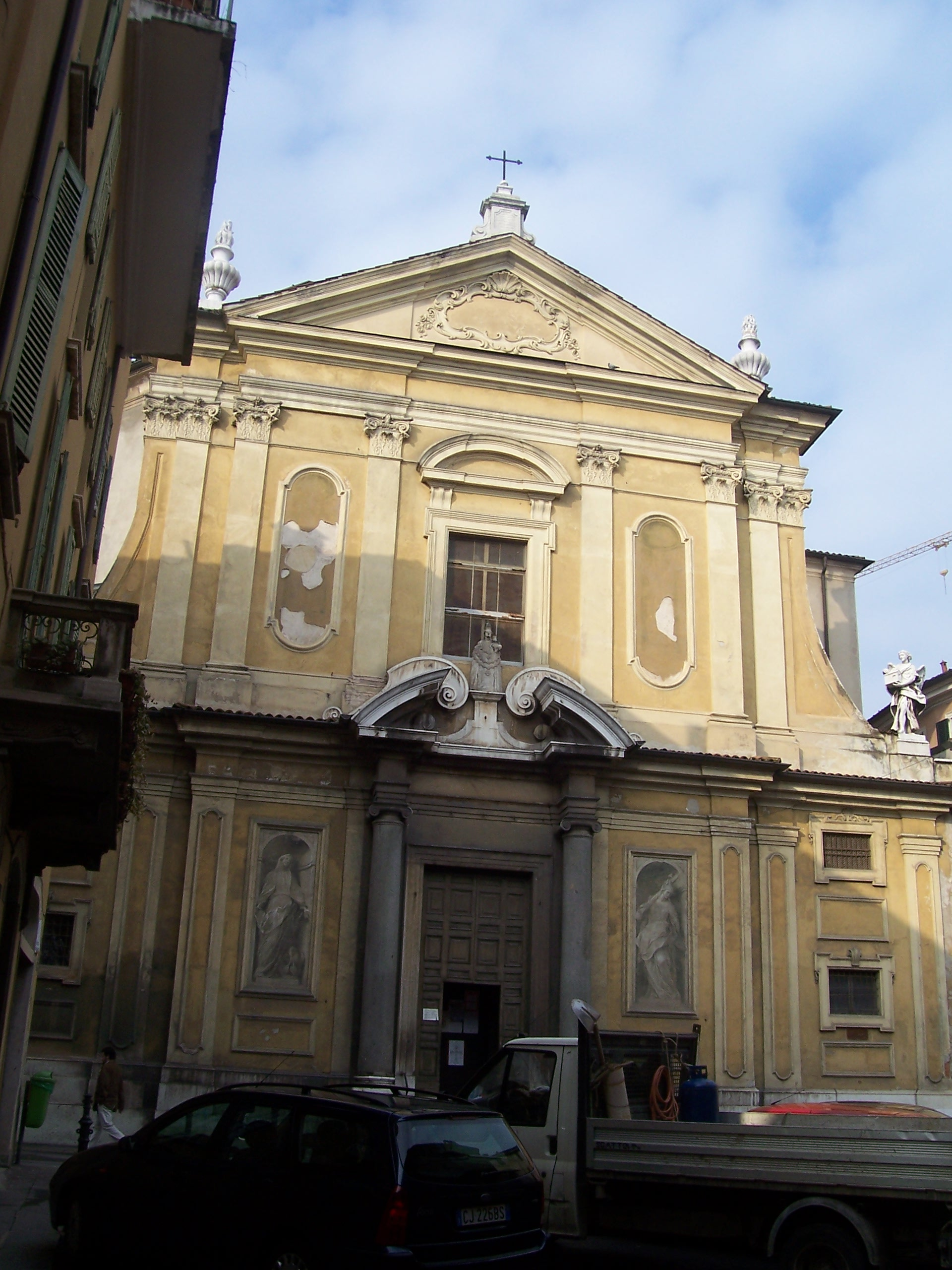 santa maria della carità brescia3.jpg